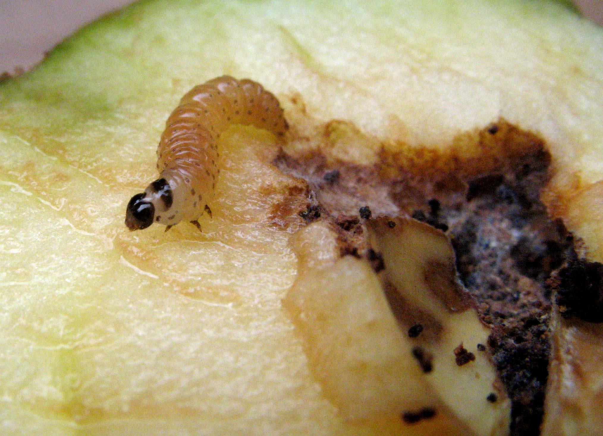 Apfelwickler, Larve am Apfelkerngehäuse